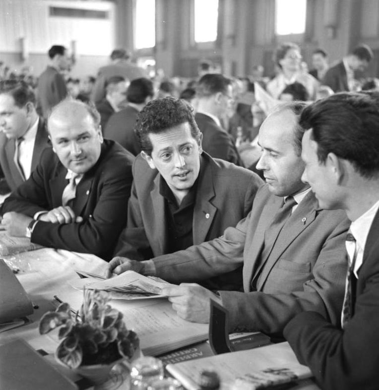 Zentralbild/Sturm/Hochneder 27.4.1960 Berlin: Kulturkonferenz eröffnet Die Kulturkonferenz 1960 des Zentralkomitees der Sozialistischen Einheitspartei Deutschlands, des Ministeriums für Kultur und des Deutschen Kulturbundes ist am 27.4.1960 im Kulturhaus des VEB Elektrokohle in Berlin Lichtenberg von dem Minister für Kultur, Alexander Abusch, eröffnet worden. UBz.: Heinrich Witz, Kunstmaler aus Leipzig (3.v.rechts) im Gespräch mit Wismut-Kumpeln, in deren Auftrag des Bild "Der neue Anfang", das für den Kunstpreis des FDGB vorgeschlagen wurde, entstand.